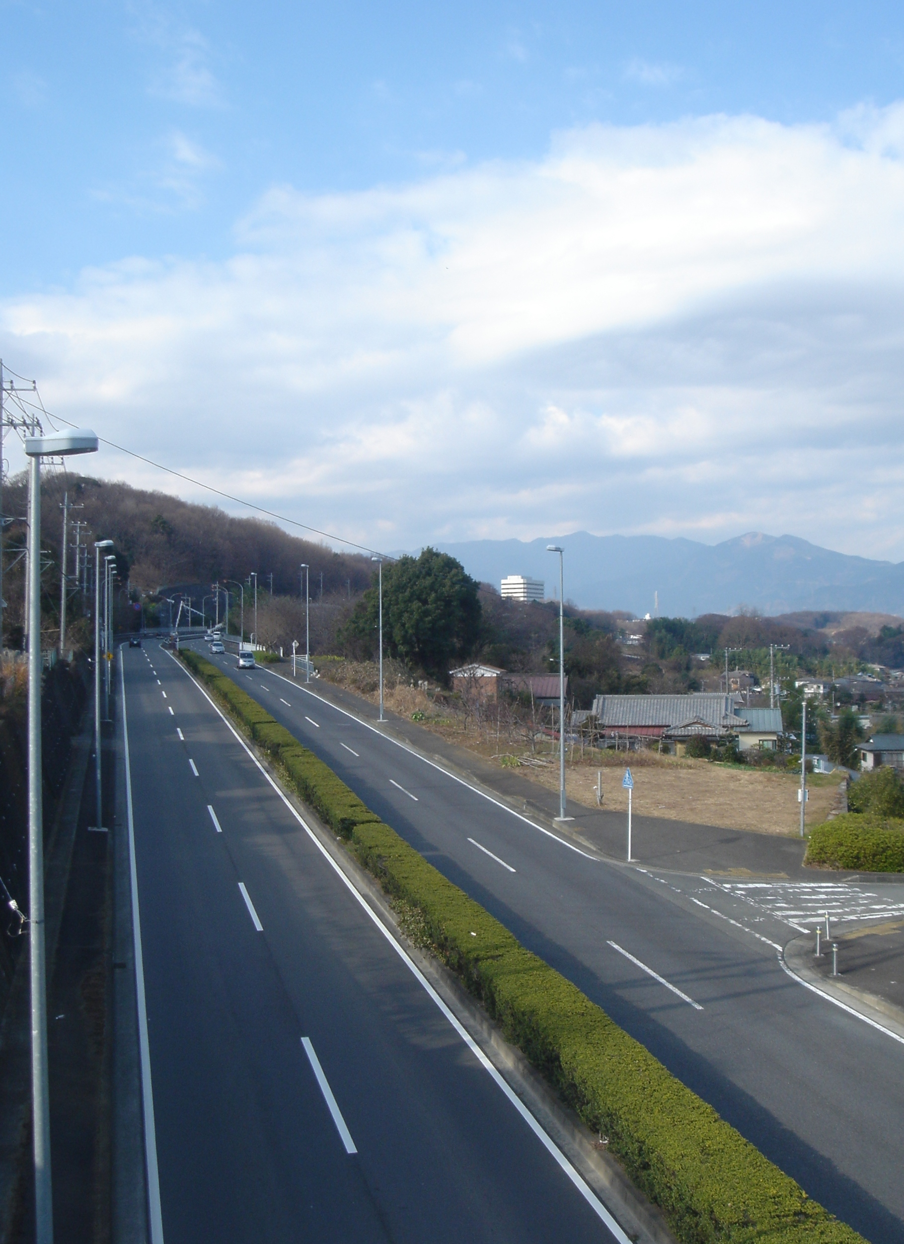 神奈川県道71号秦野二宮線。農免陸橋付近。